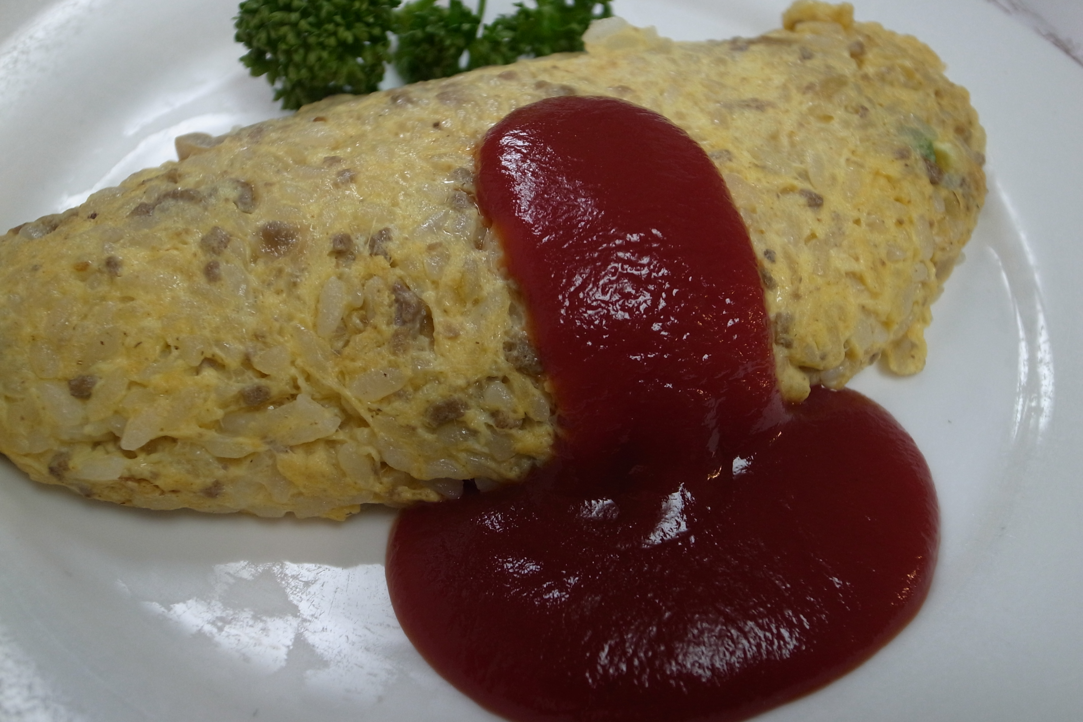 Rice Omlette, Renga-Tei, Ginza